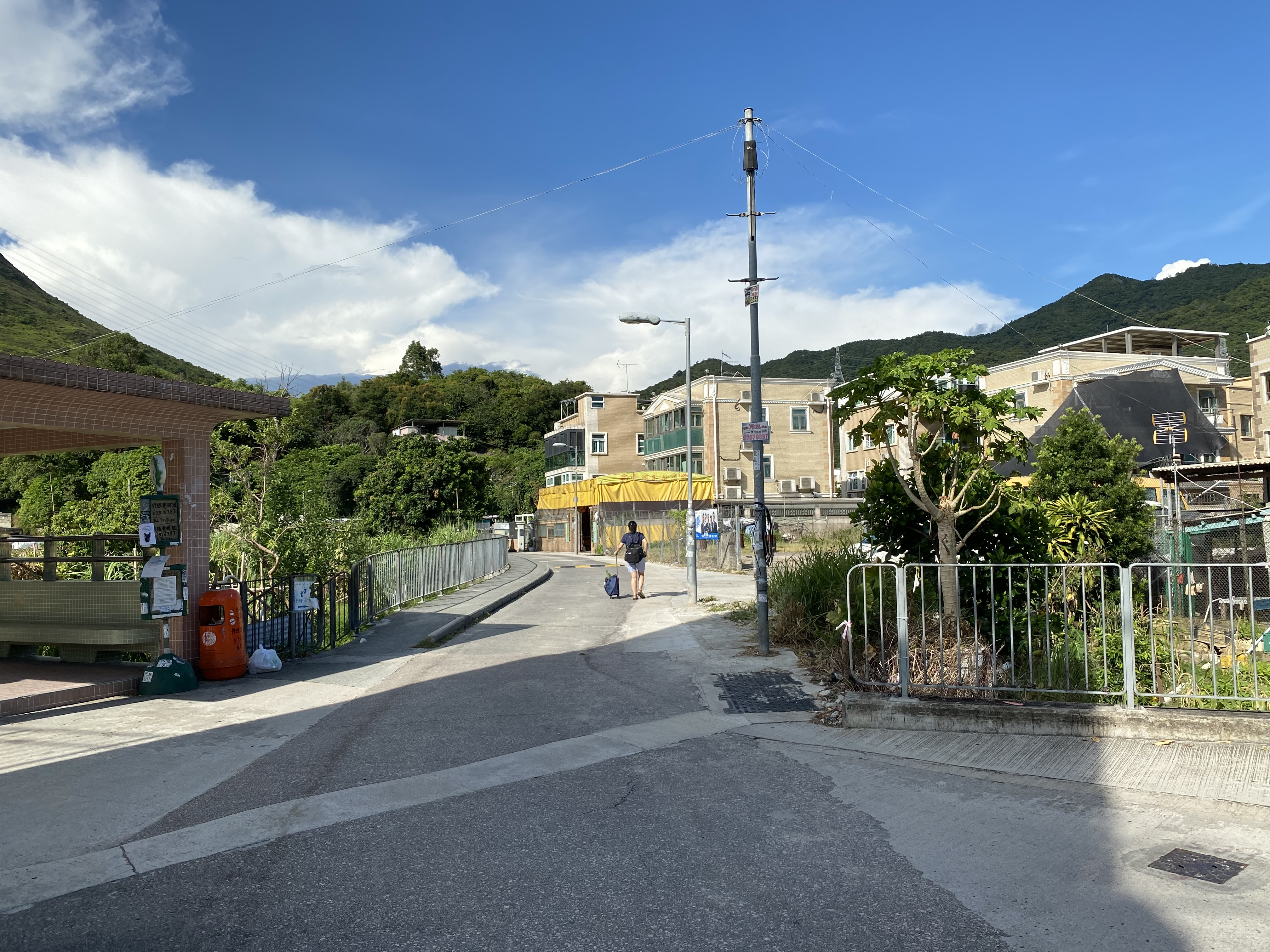 中文（香港）: This photo is taken in Kau Lung Hang.